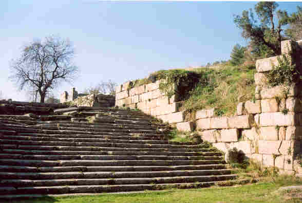 Labranda, Treppenanlage, Bild Thomas Kutzli, Januar 2003, GNU-FDL